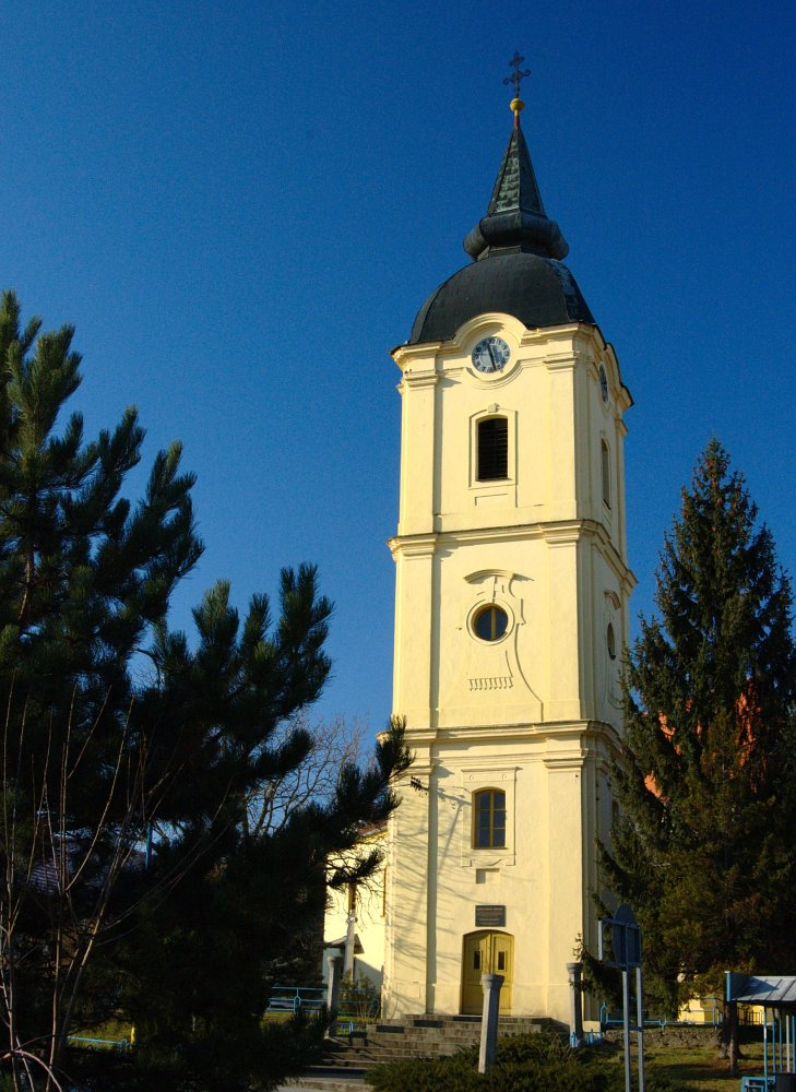 Šikmá veža, Vrbové